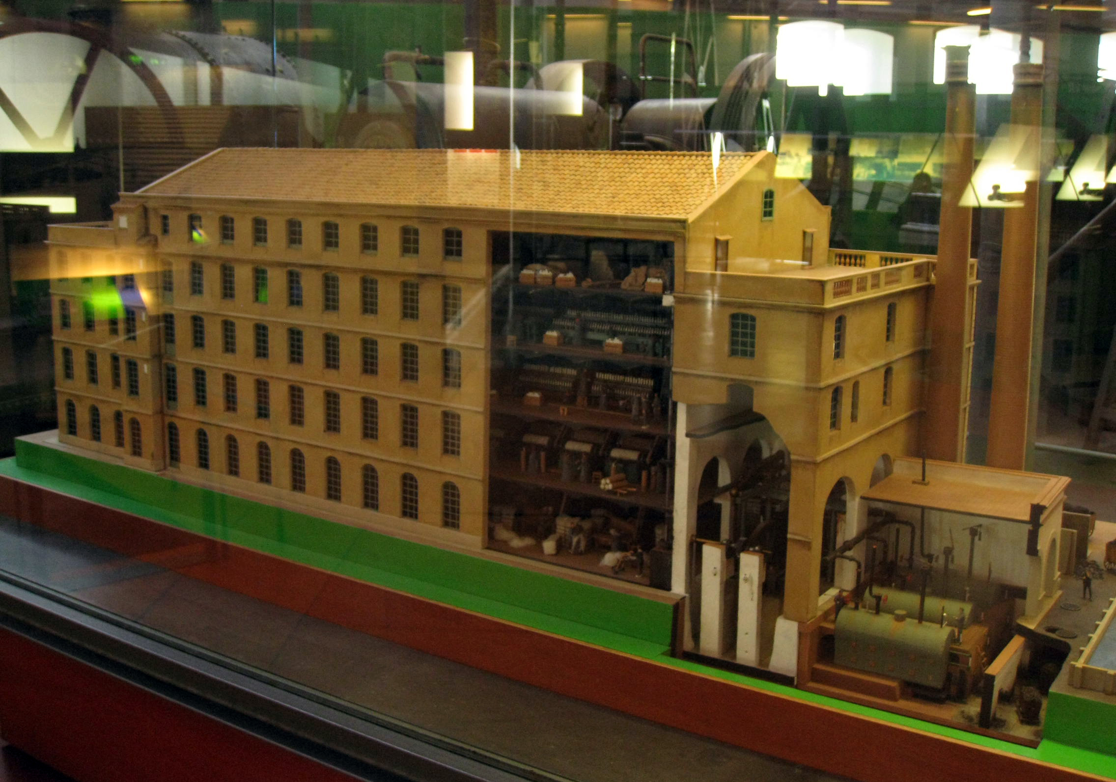 Fàbrica Aymerich, Amat i Jover (Terrassa) Object location41° 33′ 54.49″ N, 2° 00′ 28.14″ E